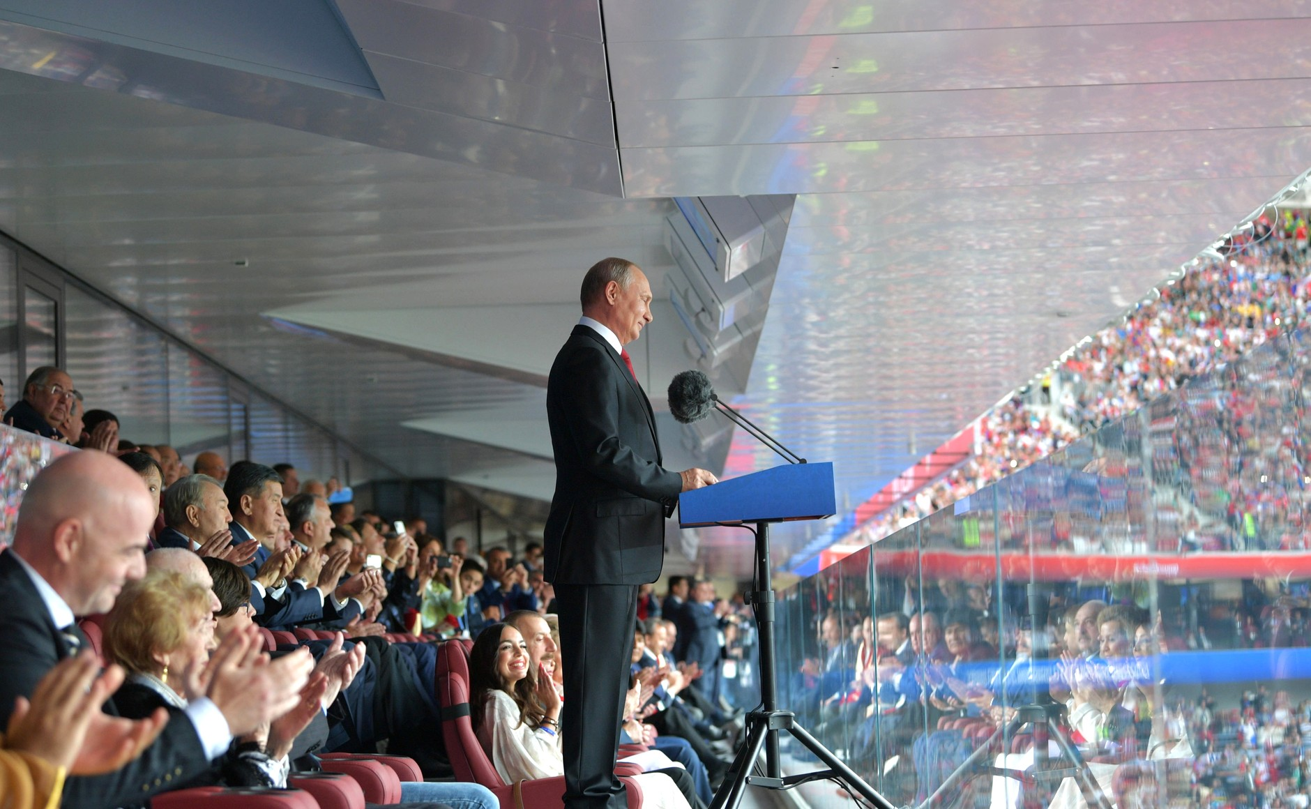 Церемония открытия чемпионата мира по футболу 2018 года